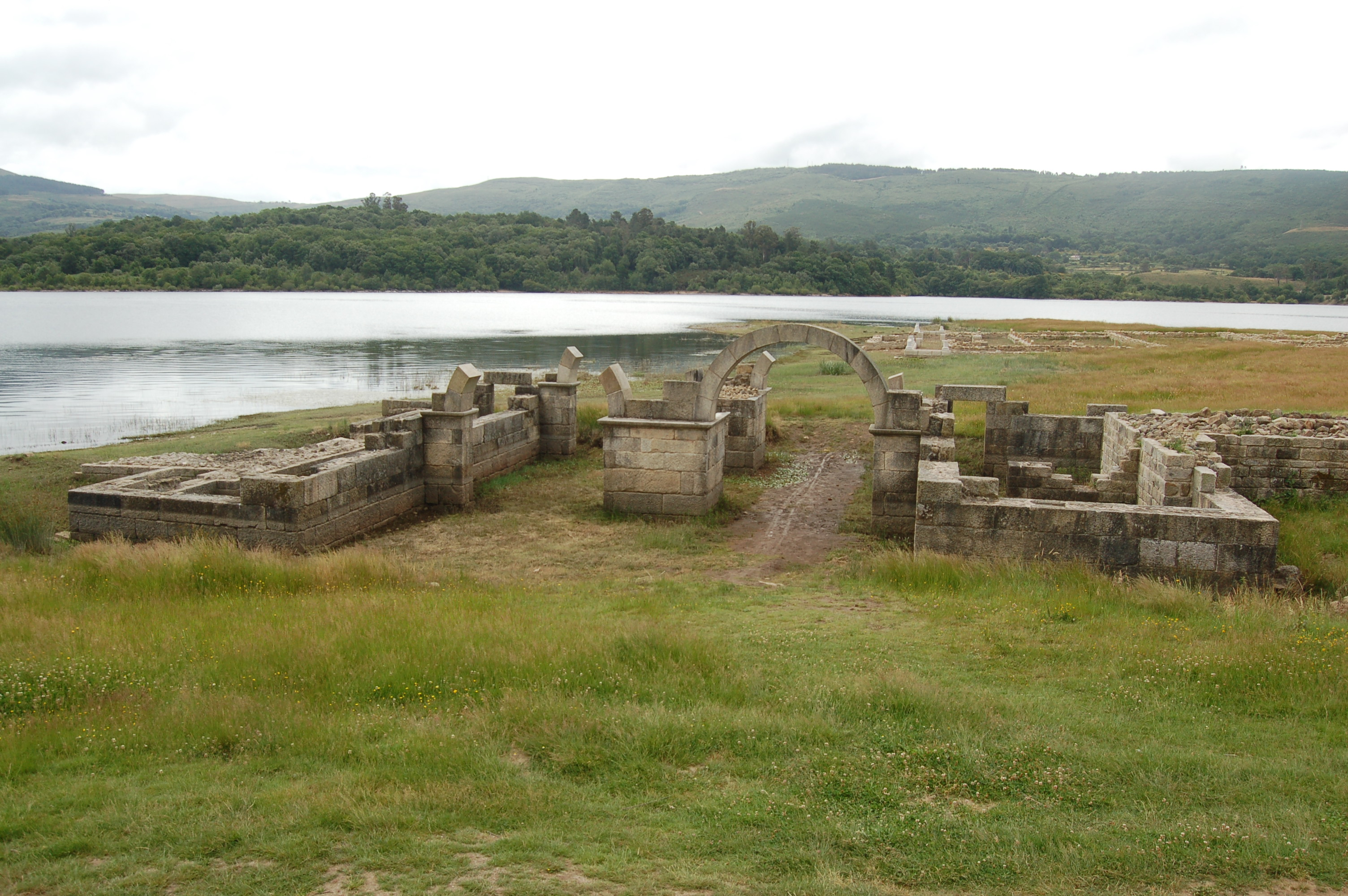 Entrada principal ó recinto de Aquis Querquennis Categoría:Imaxes de Bande